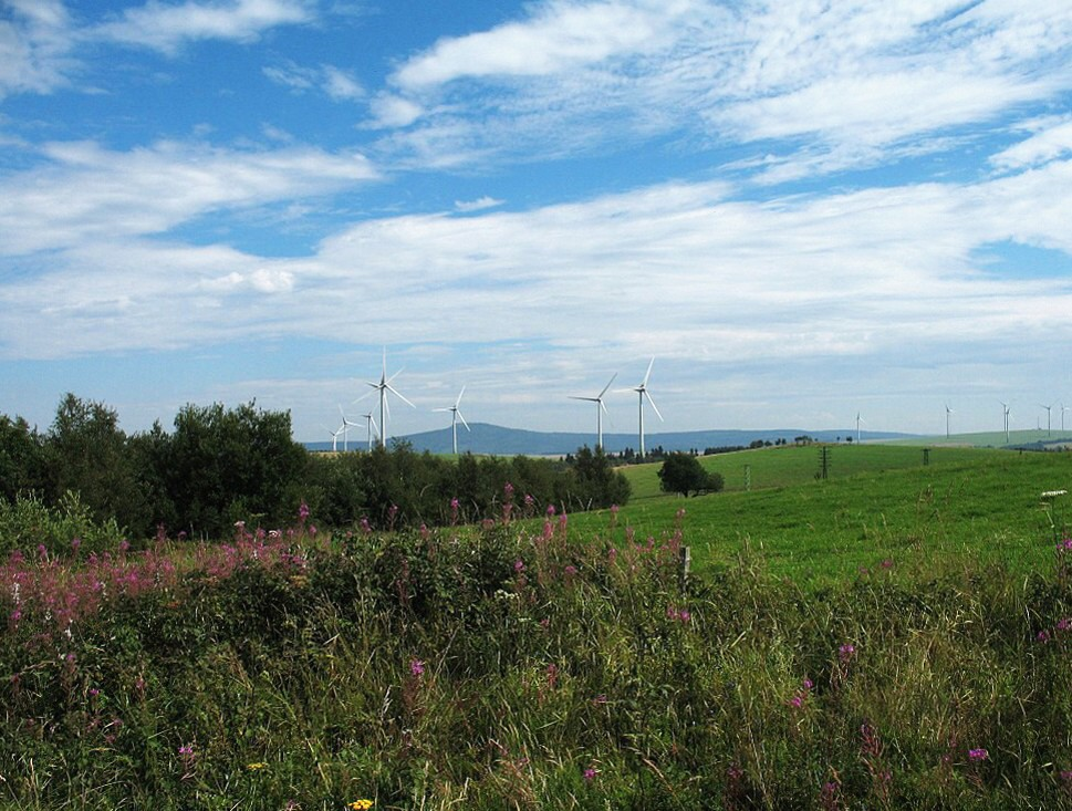 Větrný park Kryštofovy Hamry